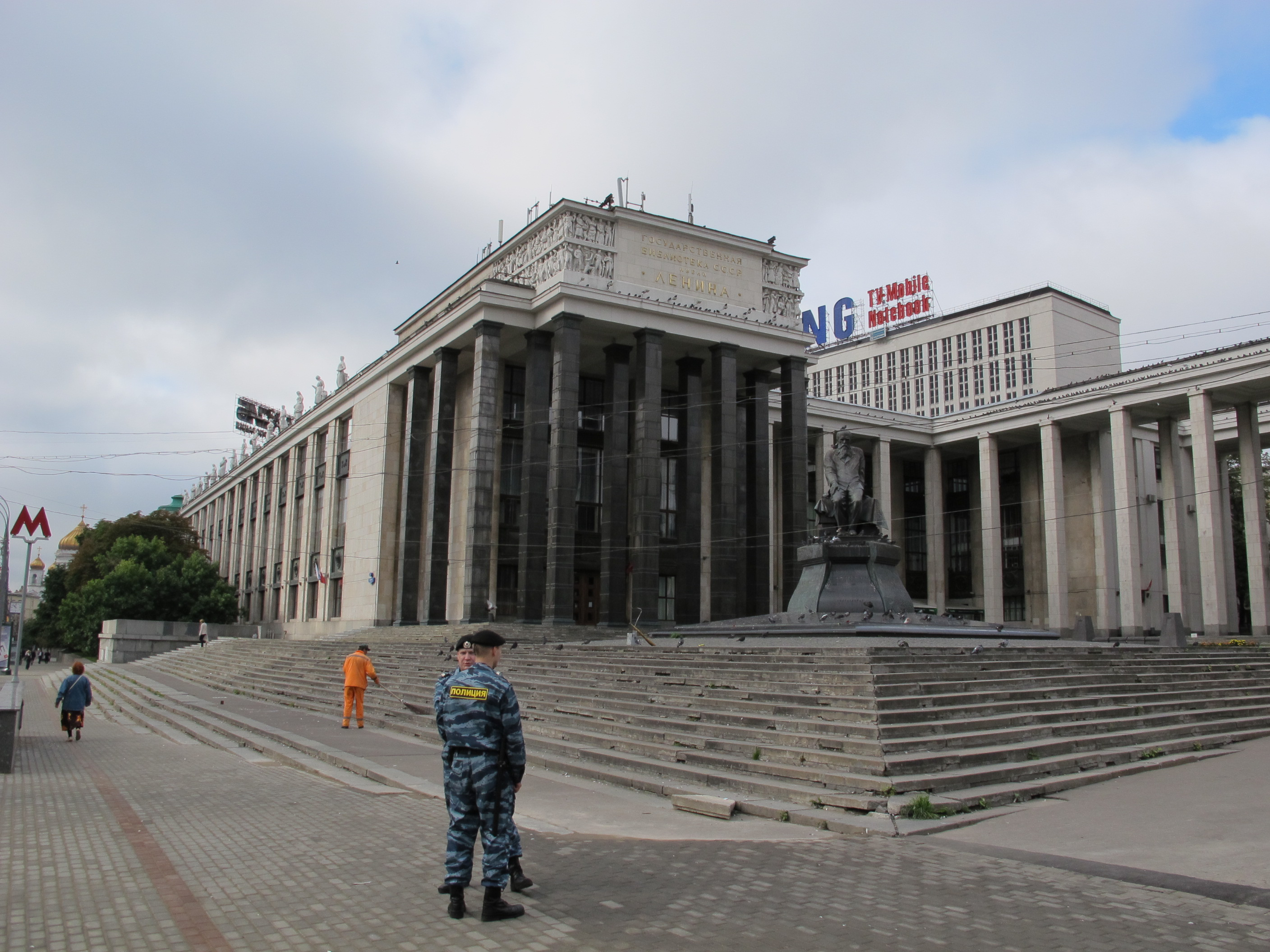 Biblioteca im lenina